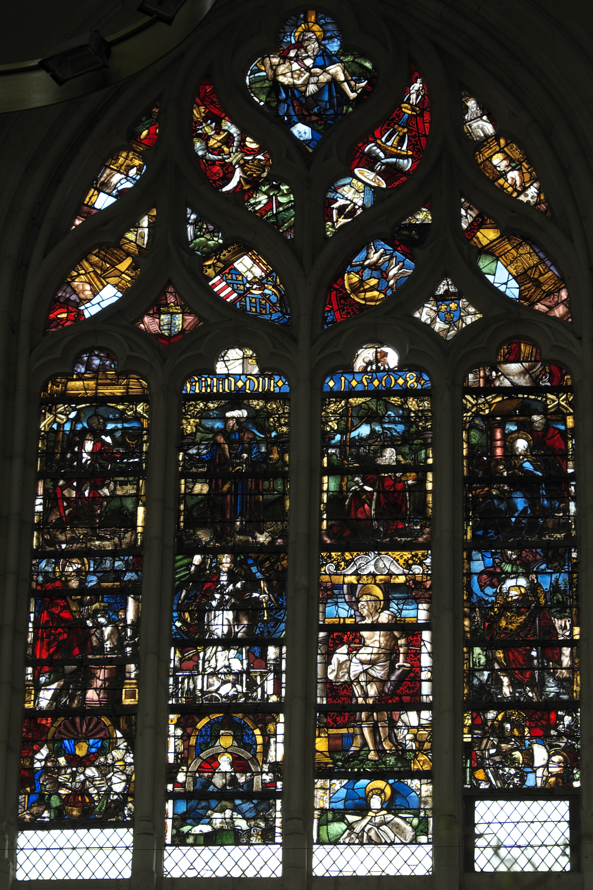 Bleiglasfenster (Baie 113) in der Basilika Saint-Nicolas in Saint-Nicolas-de-Port im Département Meurthe-et-Moselle (Lothringen/Frankreich), obere Szenen um 1508—1510, aus der Werkstatt von Veit Hirschvogel, Darstellung: Anbetung der Heiligen Drei Könige; untere Szenen um 1514—1520, aus der Werkstatt von Valentin Bousch, Darstellung: Hl. Nikolaus und die drei Scholaren im Salzfass, Erzengel Gabriel, hl. Sebastian und hl. Christophorus